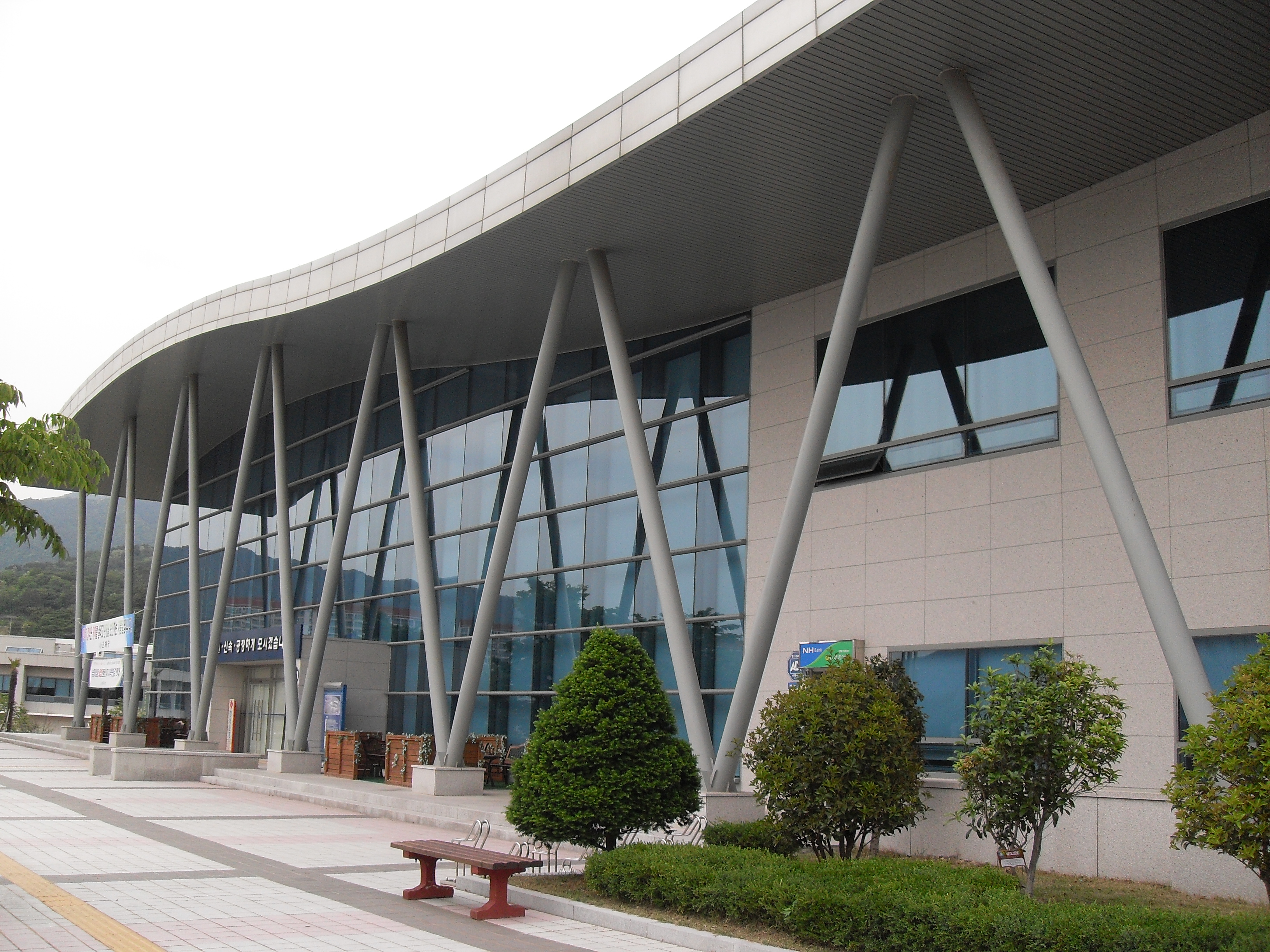 진해구청